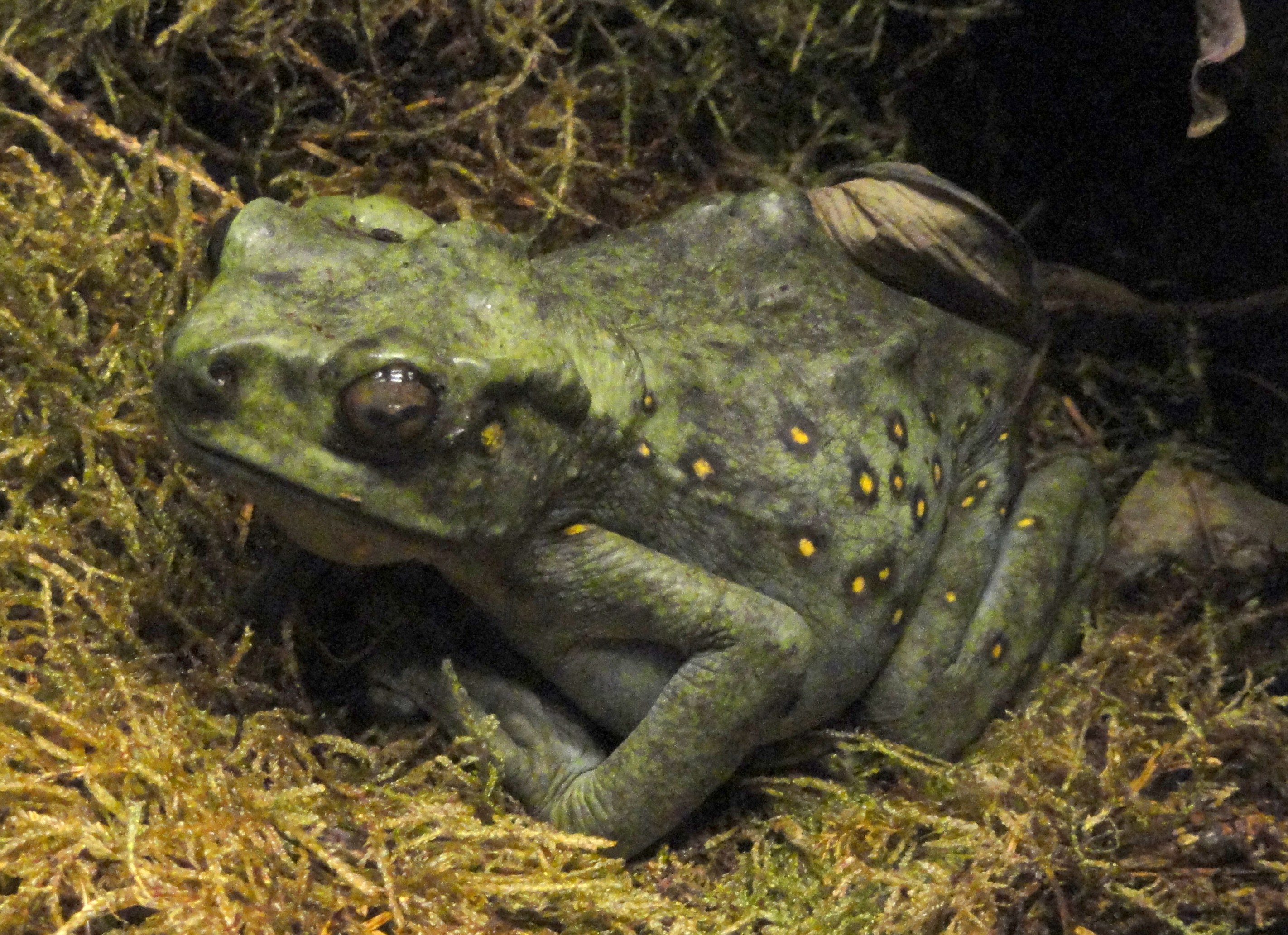 Copenhagen Zoo, Frederiksberg, Copenhagen, Denmark.